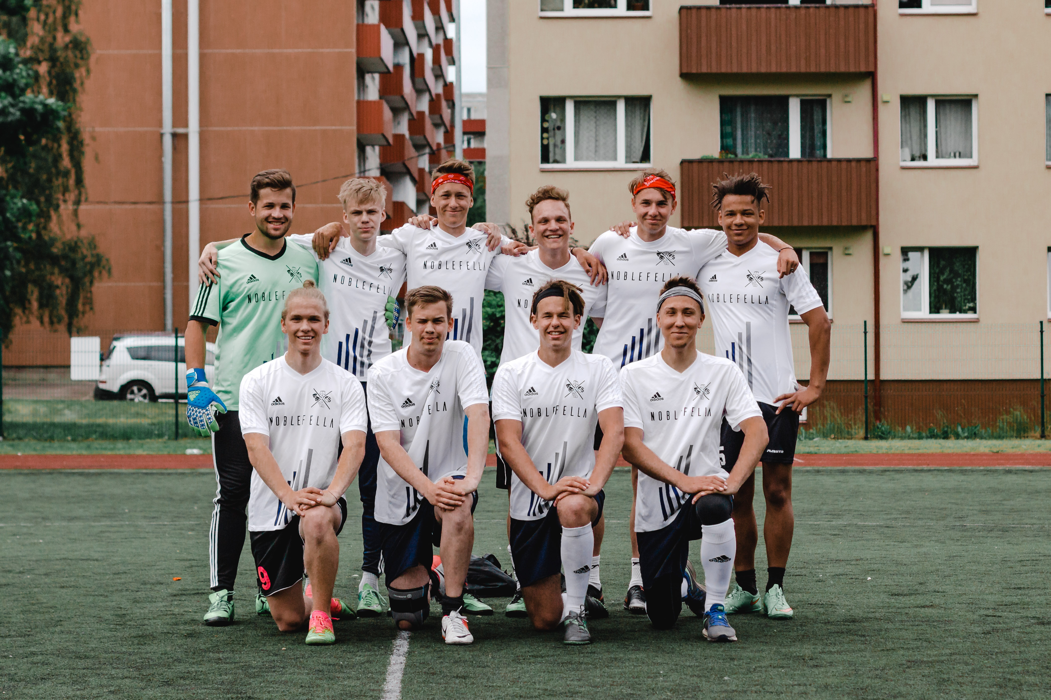 JK 32. KK 2017. aasta hooaja mänguvormis